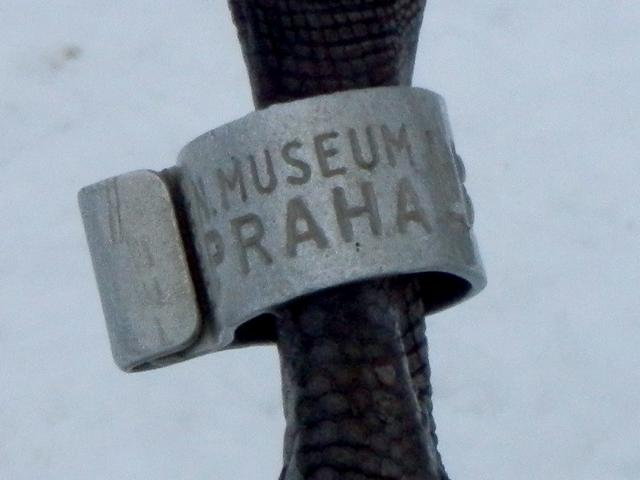 Český kroužek N. MUSEUM PRAHA - LB na labuti